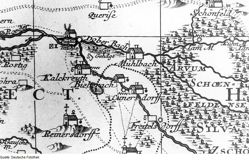 Original image description from the Deutsche Fotothek Großenhain-Folbern. Paulsmühle, Seutter, Kirchenkreis Dresden, Mitte 18. Jh. (Sign.: VII 43)